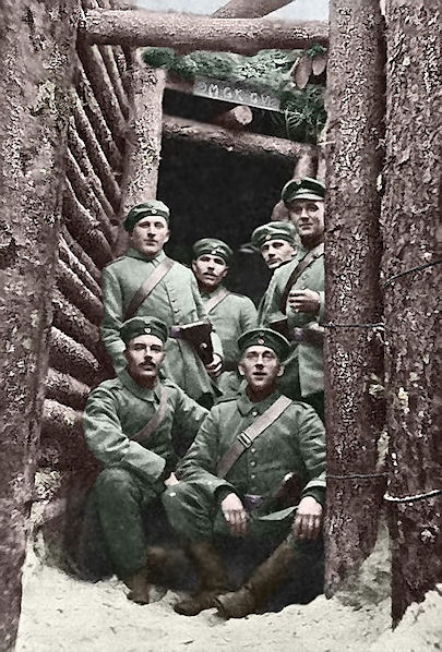 M.G.K:n miehiä (Jääkäripataljoona 27:n konekiväärikomppania) Riianlahdella syksyllä vuonna 1916 pomminkestävän korsunsa oviaukossa kuvattuna. Huomaa että, kuva on jälkeenpäin väritetty mustavalkoisesta kuvasta.